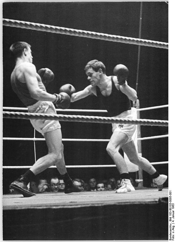 Nikandorow, Schmitt Zentralbild 4.1.1963 UdSSR-Boxer schlugen Westdeutschland 14:6 Die UdSSR-Boxer waren am 18.12.62 vor 7000 Zuschauern in der ausverkauften Kölner Sporthalle Westdeutschland im offiziellen Länderkampf mit 14:6 überlegen. Beide Länder standen sich zum 6. Male gegenüber. Bis auf ein Unentschieden konnte die sowjetische Staffel alle anderen Länderkämpfe gewinnen. Das Gesamtpunktverhältnis lautet jetzt 86:34 für die UdSSR. UBz: Im Leichtgewicht schlug der sowjetische Boxer Nikandorow (links) den westdeutschen Schmitt klar nach Punkten.